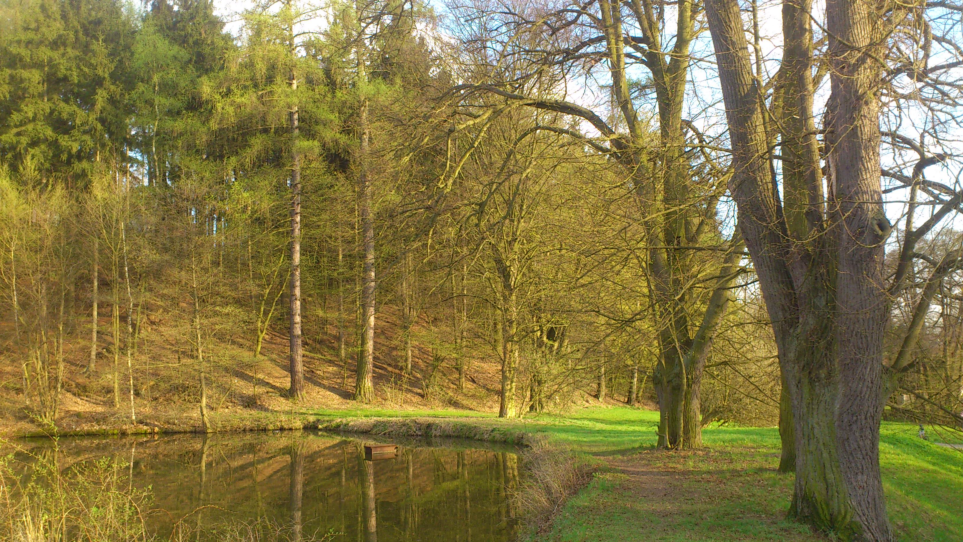 Barbora Holanová, Michaela Beránková